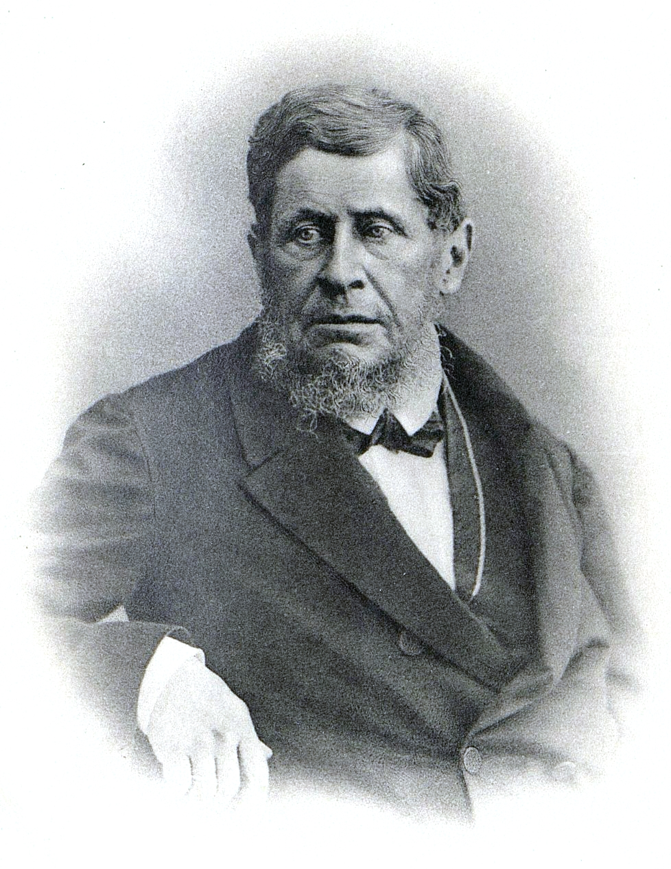 Тургенев, Николай Иванович